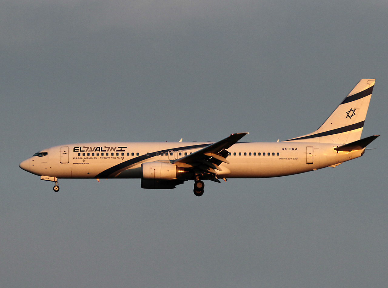 El Al Boeing 737 4X-EKA, EHAM 2-8-2010.